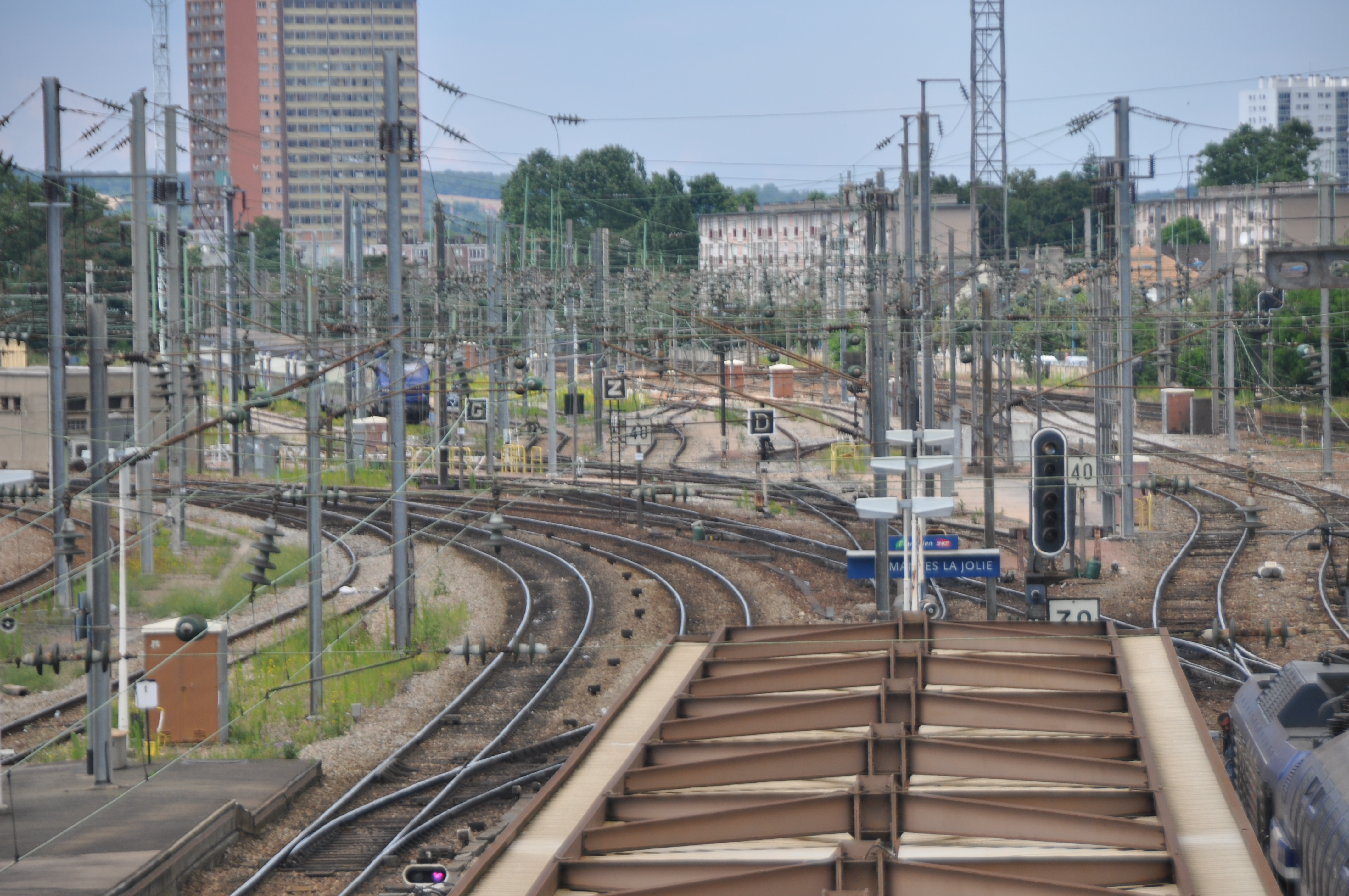 Gros plan sur la séparation des voies de la ligne de Paris-Saint-Lazare au Havre et de la ligne de Mantes-la-Jolie à Cherbourg, depuis la passerelle transversale de la gare de Mantes-la-Jolie.